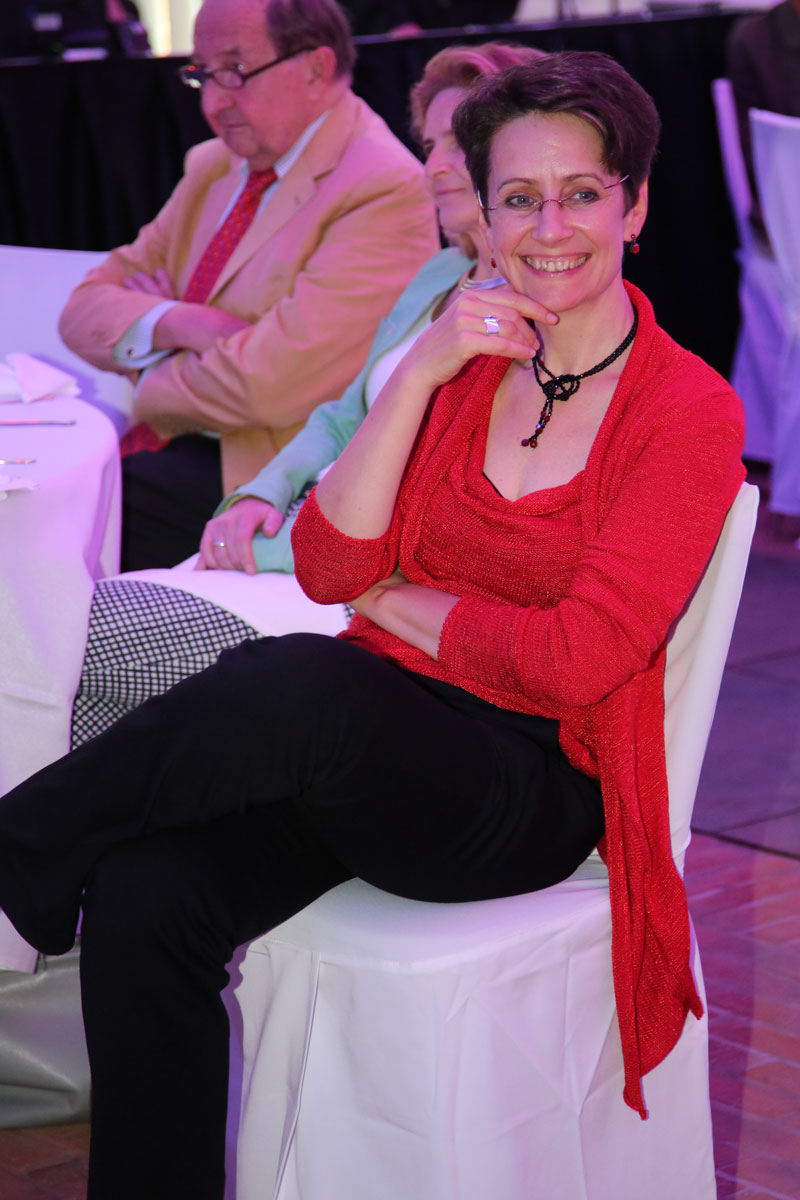 Sabine Herlitschka, Infineon-Vorstandsmitglied und Mitglied in verschiedenen Experten-Gruppen der Europäischen Kommission